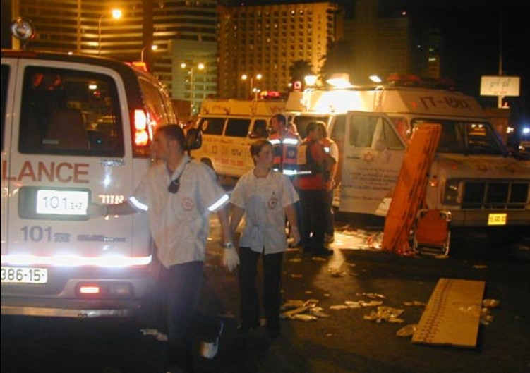 הפיגוע בדולפינריום